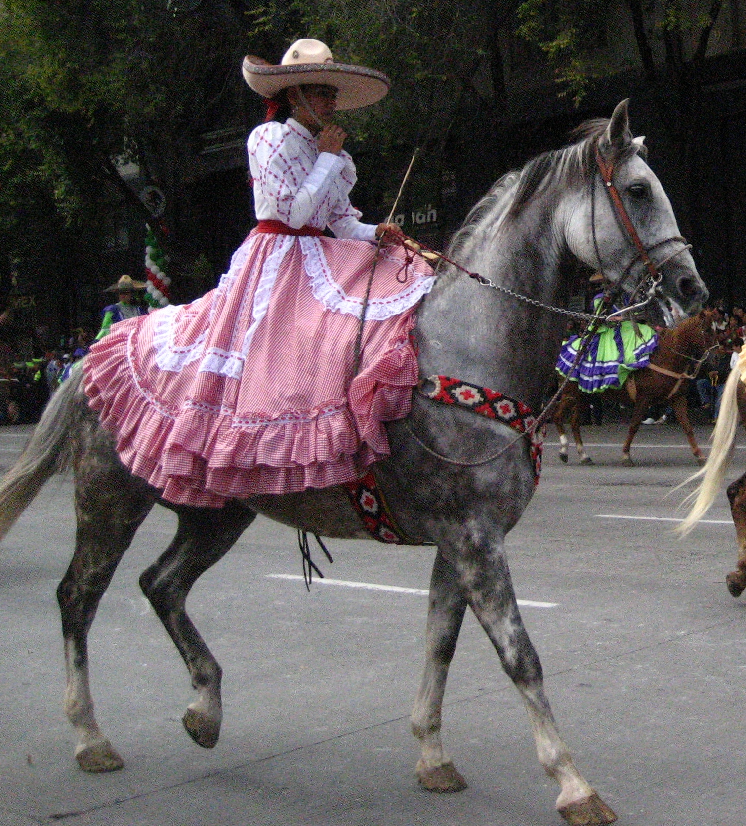 charros mexiko 16 septiembre 2009